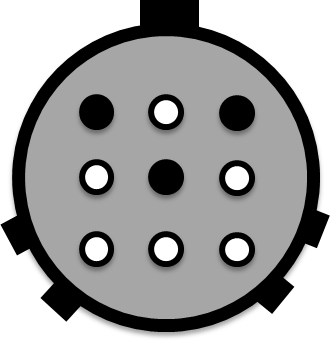 inCab Steckdose nur als Seitenzweig. Geräte dürfen maximal 1m entfernt sein.